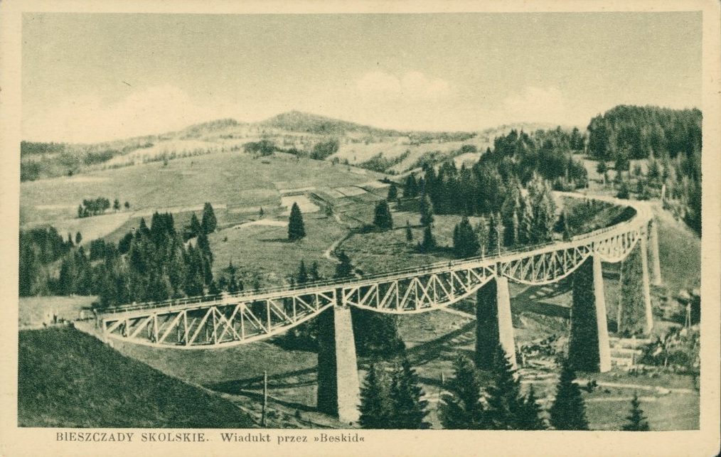 Bieszczady